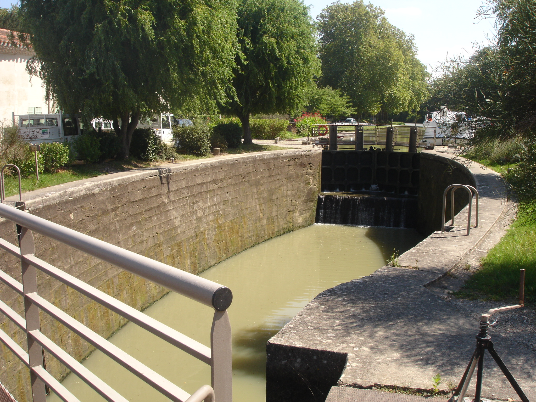 France, Haute-Garonne (31), Canal du Midi, écluse de Négra près de Villefranche-de-Lauragais.